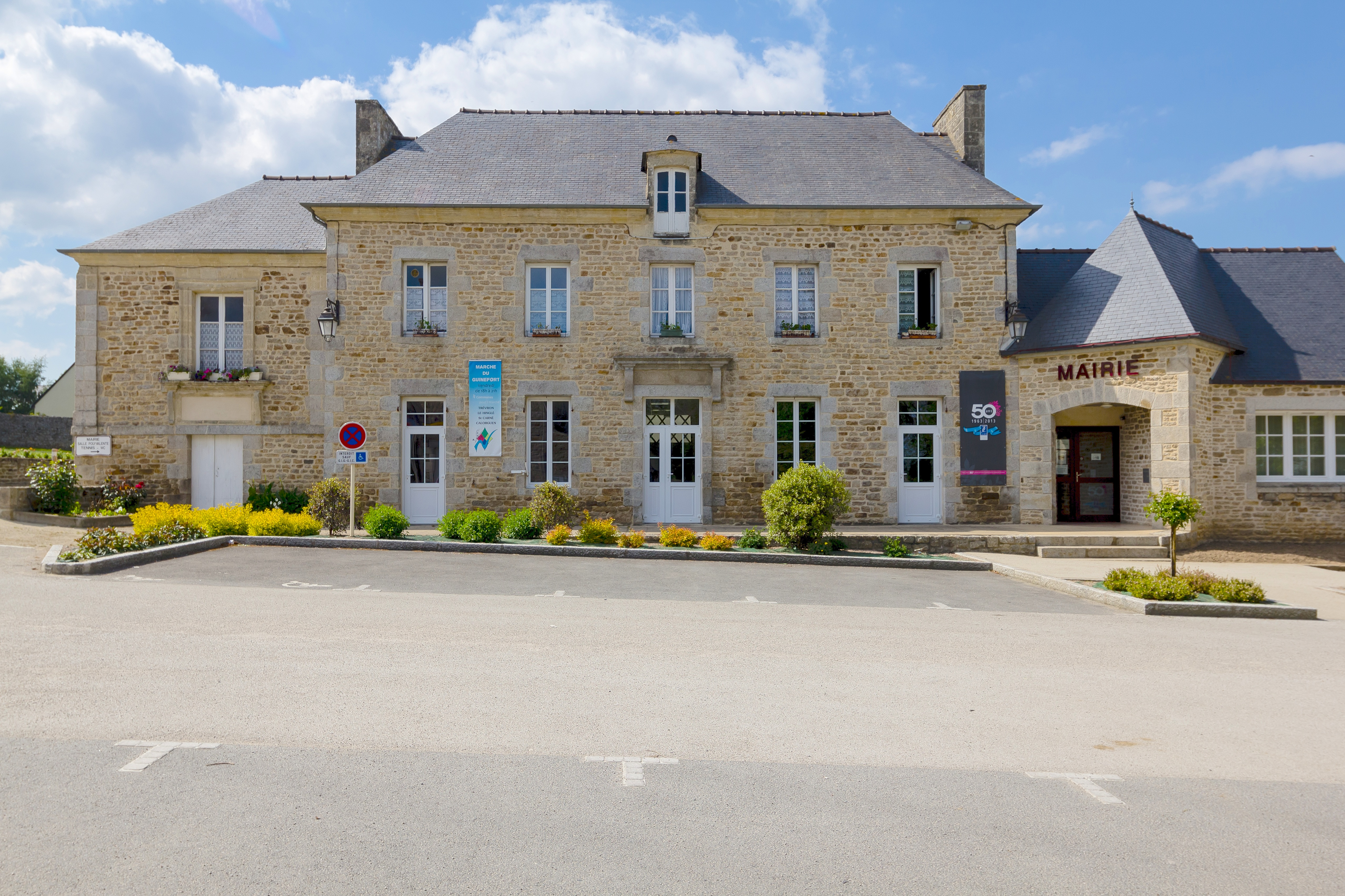 Mairie de Calorguen (France).